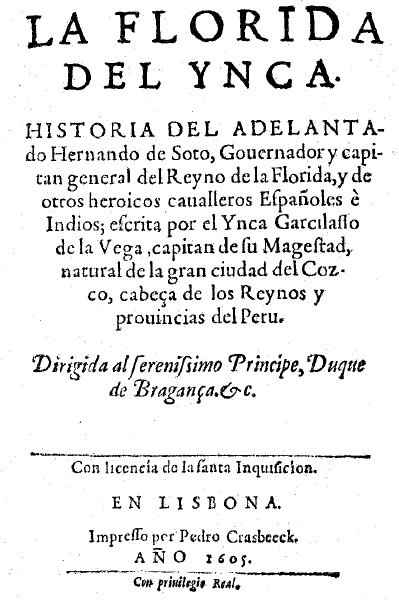 Portada de la primera edición de LA FLORIDA DEL INCA, año 1605. Obra del escritor peruano Inca Garcilaso de la Vega.